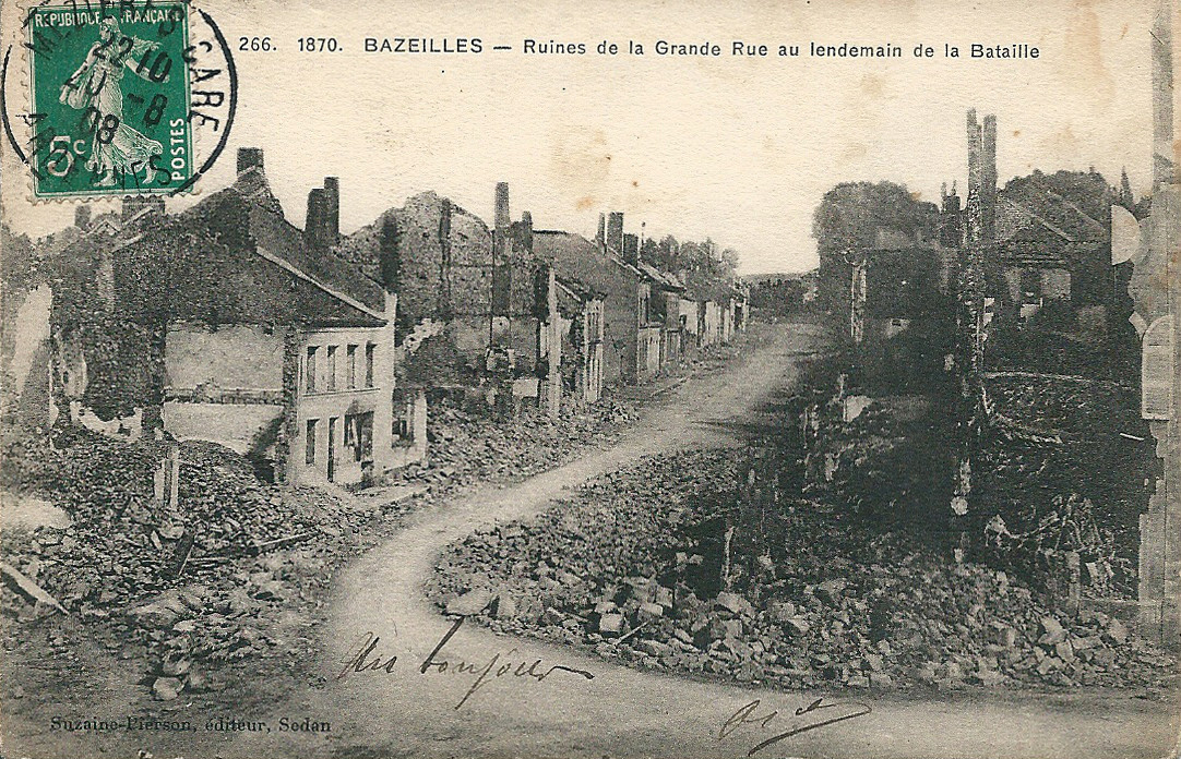 Ruines de Bazeilles (Ardennes, France) , après les combats de la Bataille de Bazeilles en 1870